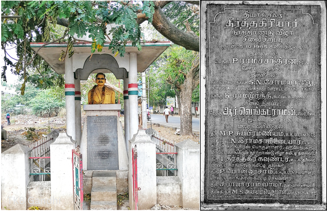 தியாகி தீர்த்தகிரியாரின் நூற்றாண்டு விழாவில் (05.10.1985-அன்று) முன்னாள் இந்திய குடியரசு தலைவர் மேதகு. ஆர். வெங்கட்ராமன் அவர்கள் தர்மபுரி நெசவாளர் காலனியில் திறந்துவைத்த தீர்த்தகிரியாரின் உருவச்சிலை.